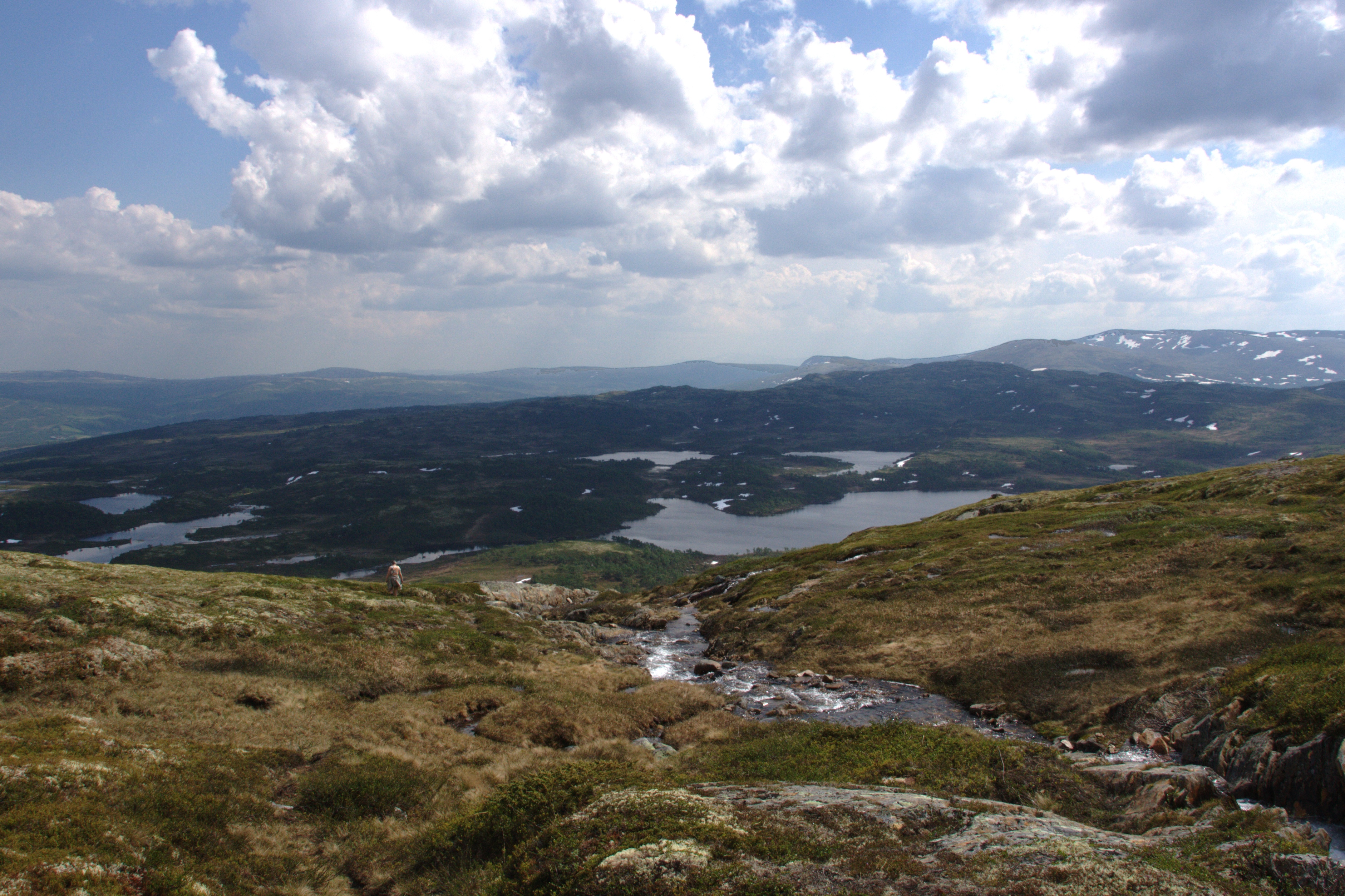 Båttjønndalen in Holtålen, Norway